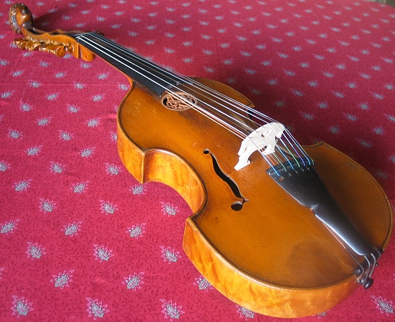 Viola d'amore um 1770, Joseph-Nicolas Leclerc au quinze-vingts Paris. Brandmarke: Leclerc 1520 Paris